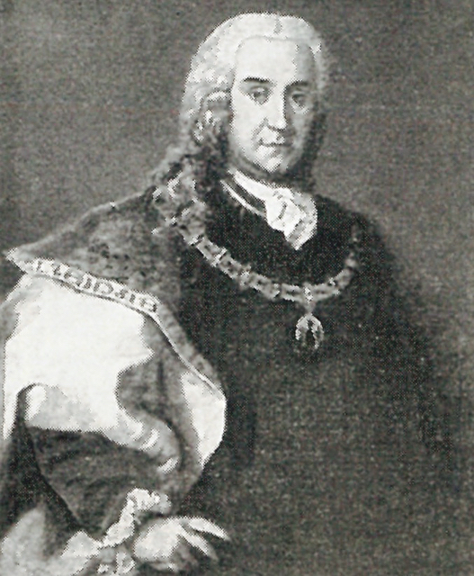 Corfitz Anton Ulfeldt (1699-1769), ubekendt maler